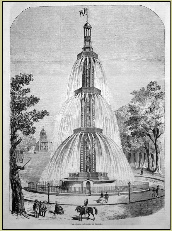 Colonne du puits artésien de Grenelle construite sur la place de Breteuil à Paris